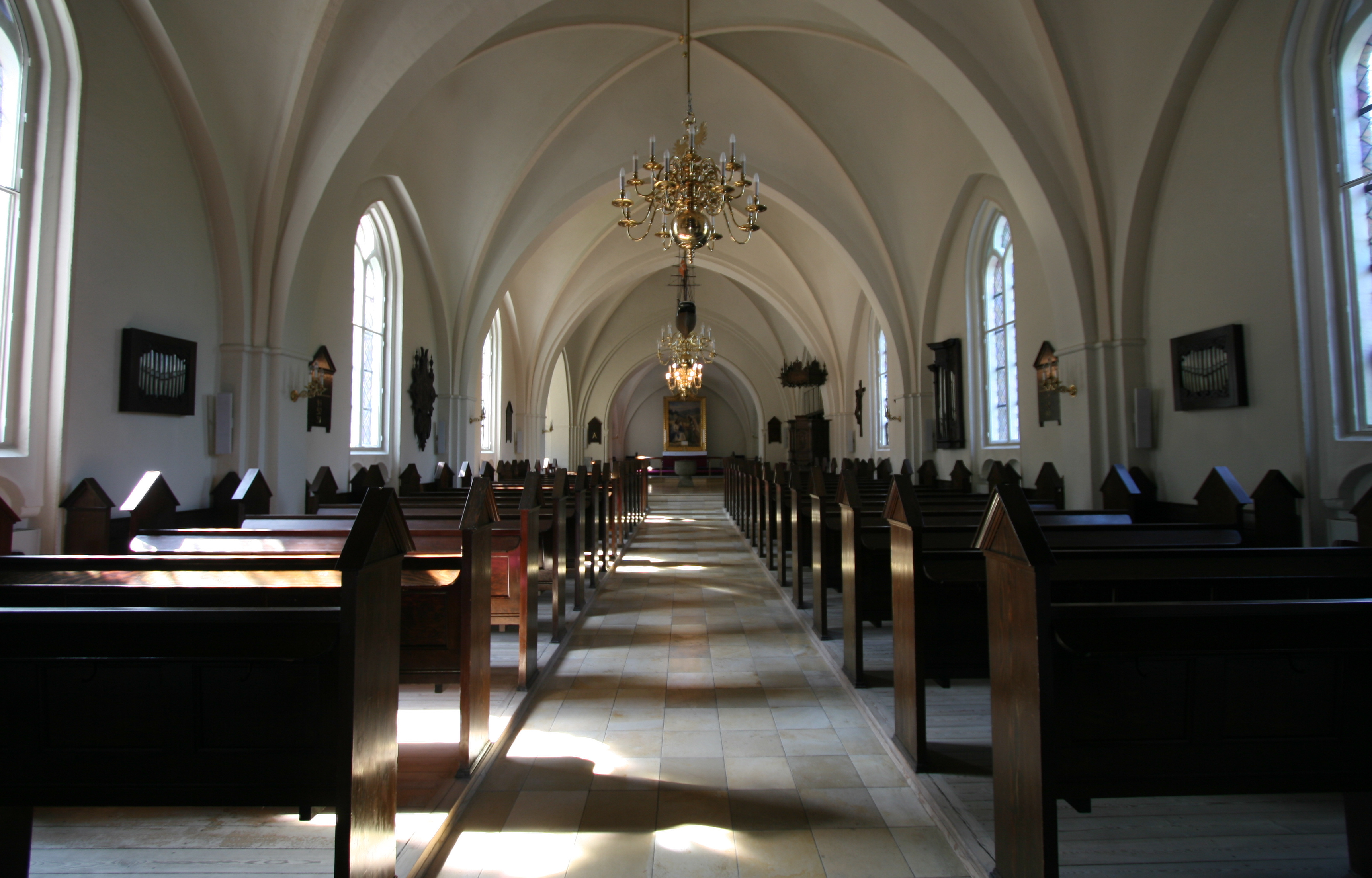 Kildevældskirken in Copenhagen, Denmark. Wide angle view of interior.